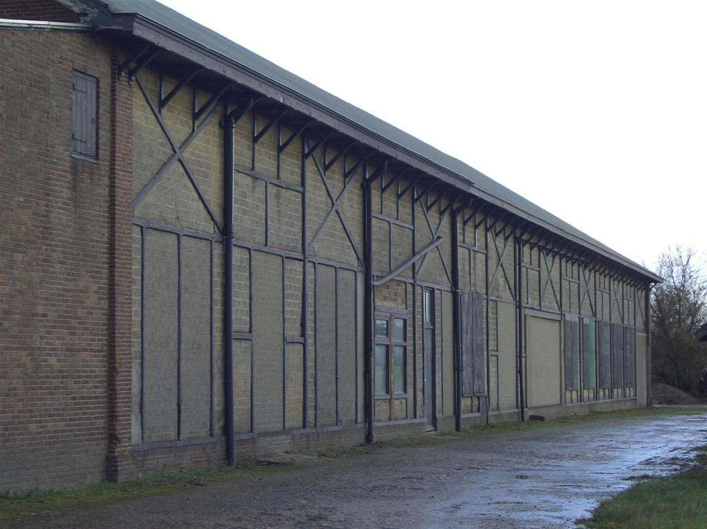 De remise oan de Lútskedyk yn Stiens.